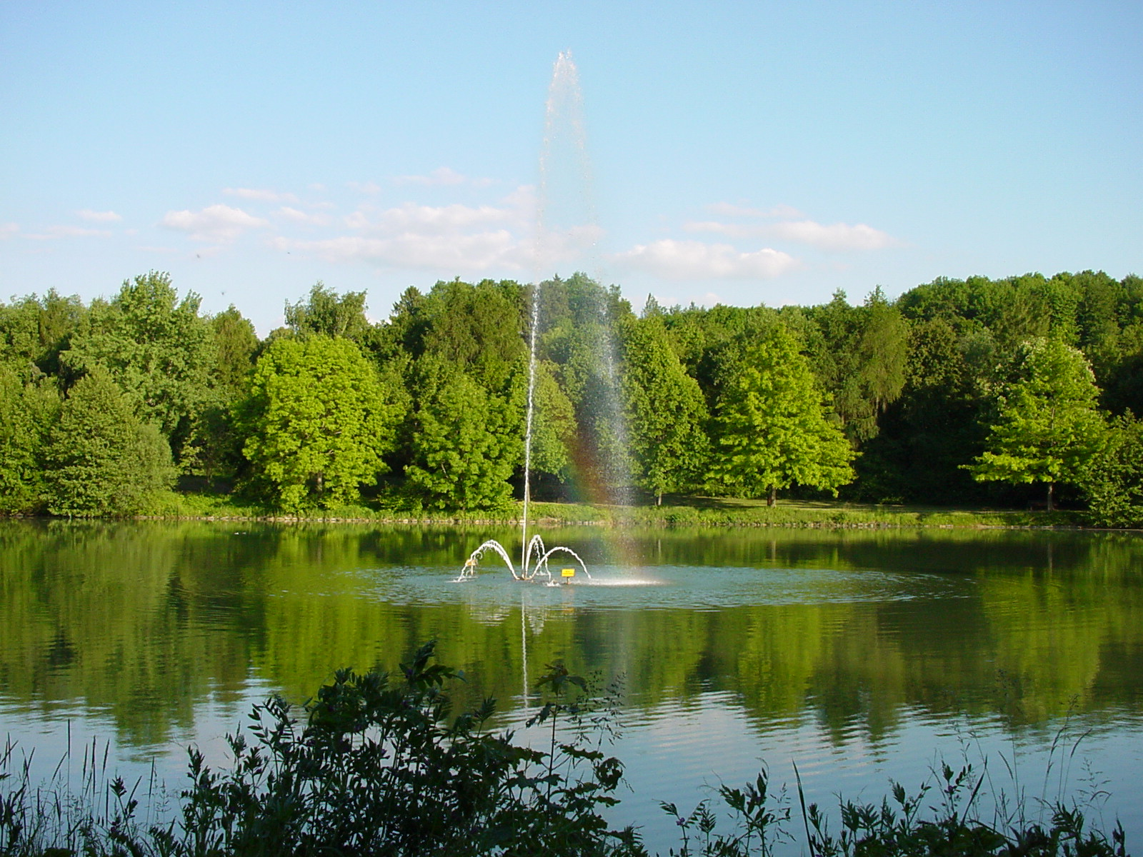 Der Ommersheimer Weiher in der Naherholungsanlage Gangelbrunnen